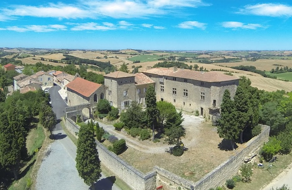 Château de Mézerville